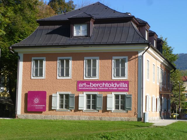 Bertoldsvilla, Salzburg